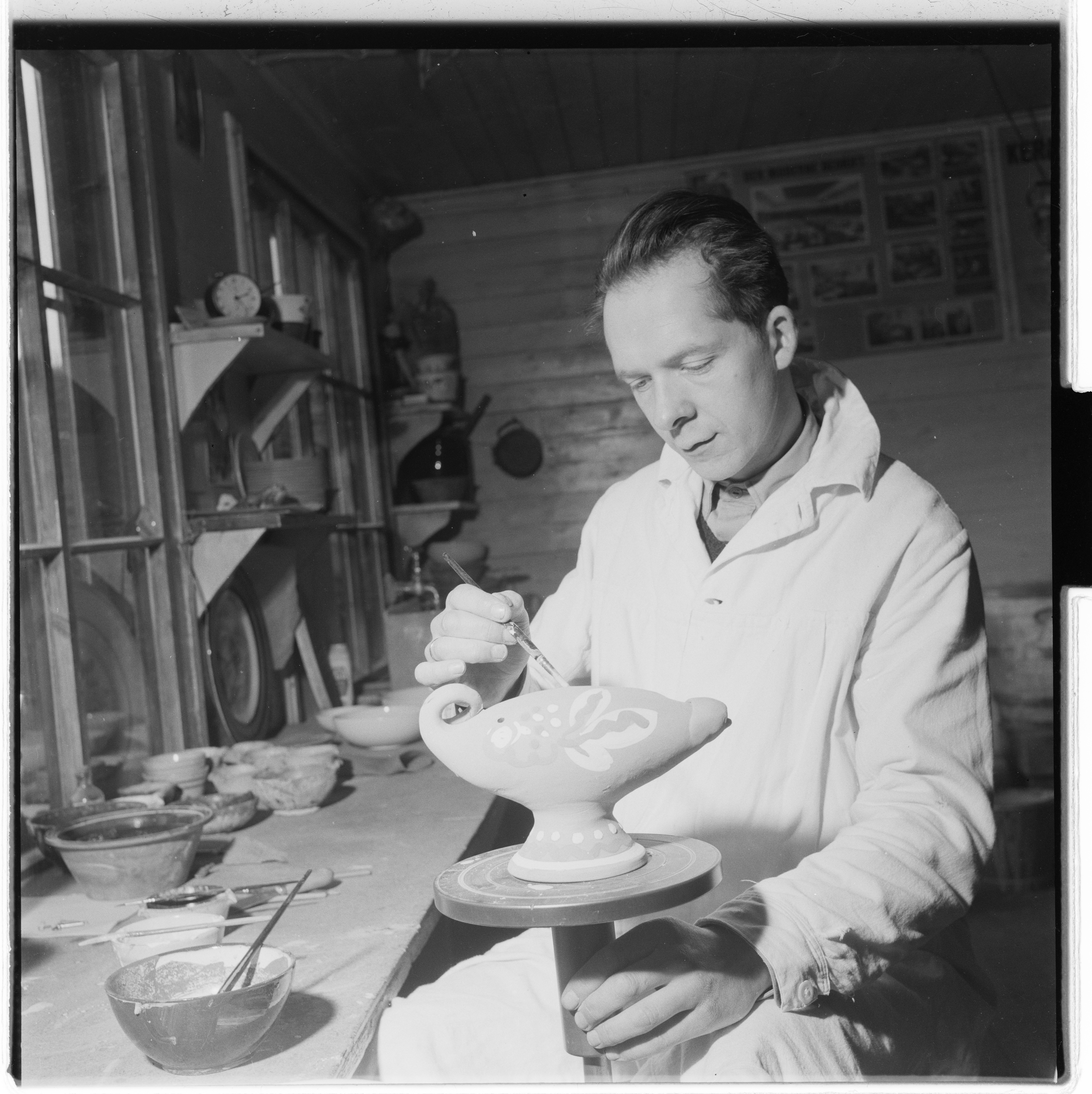 Bildet er hentet fra Arkivverket. Ganns Potteri & Teglverk, Sandnes. NÅ nr. 6, 1953 Arkivinstitusjon : Riksarkivet Arkivnavn : Billedbladet NÅ Sted : Norge, Rogaland, Sandnes, Sandnes Emneord: Menn, Arbeid, Keramikk, Håndverk Avbildet: Ukjent